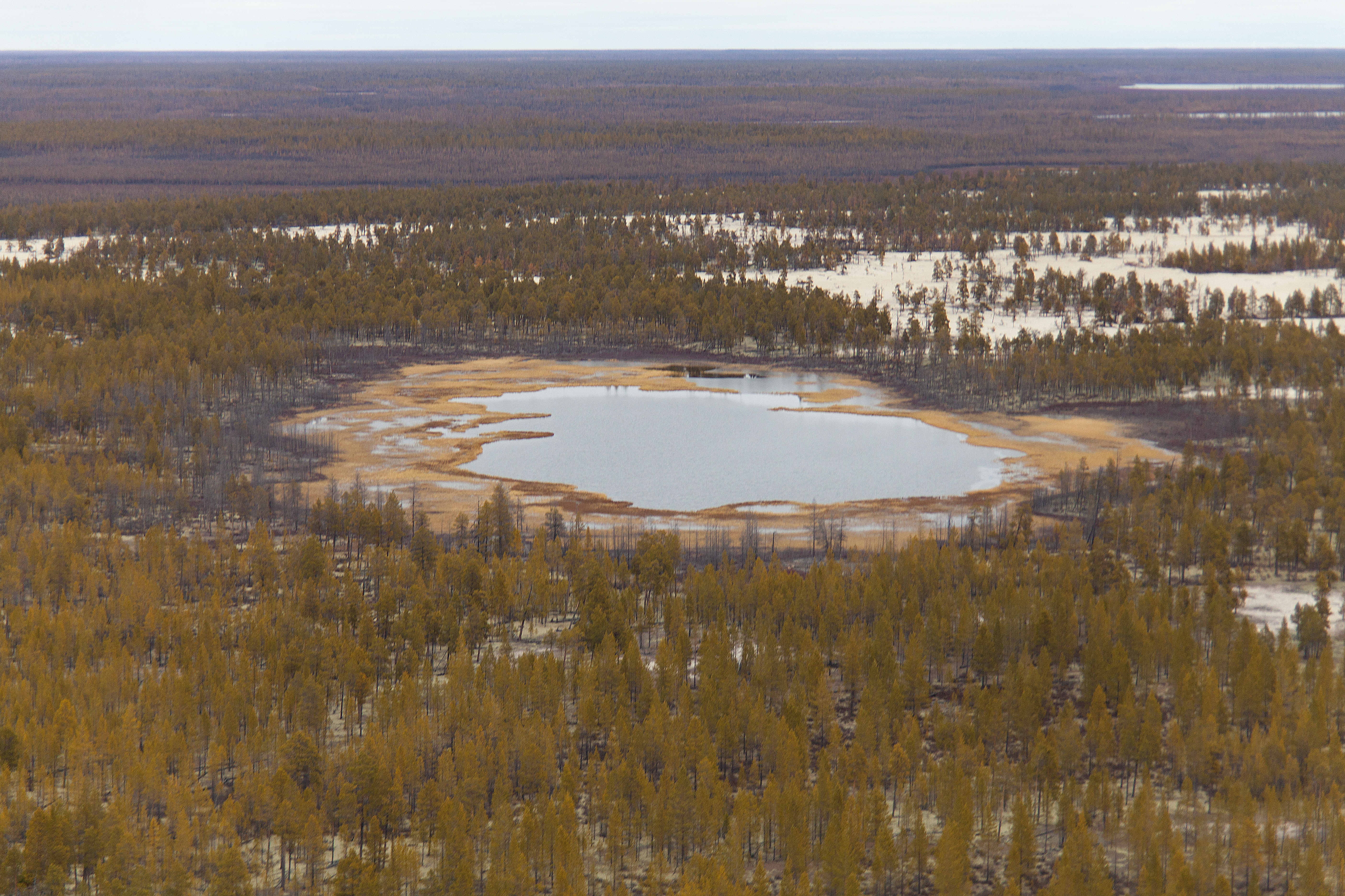 Sakha (Yakutia). Vilyuysky district.